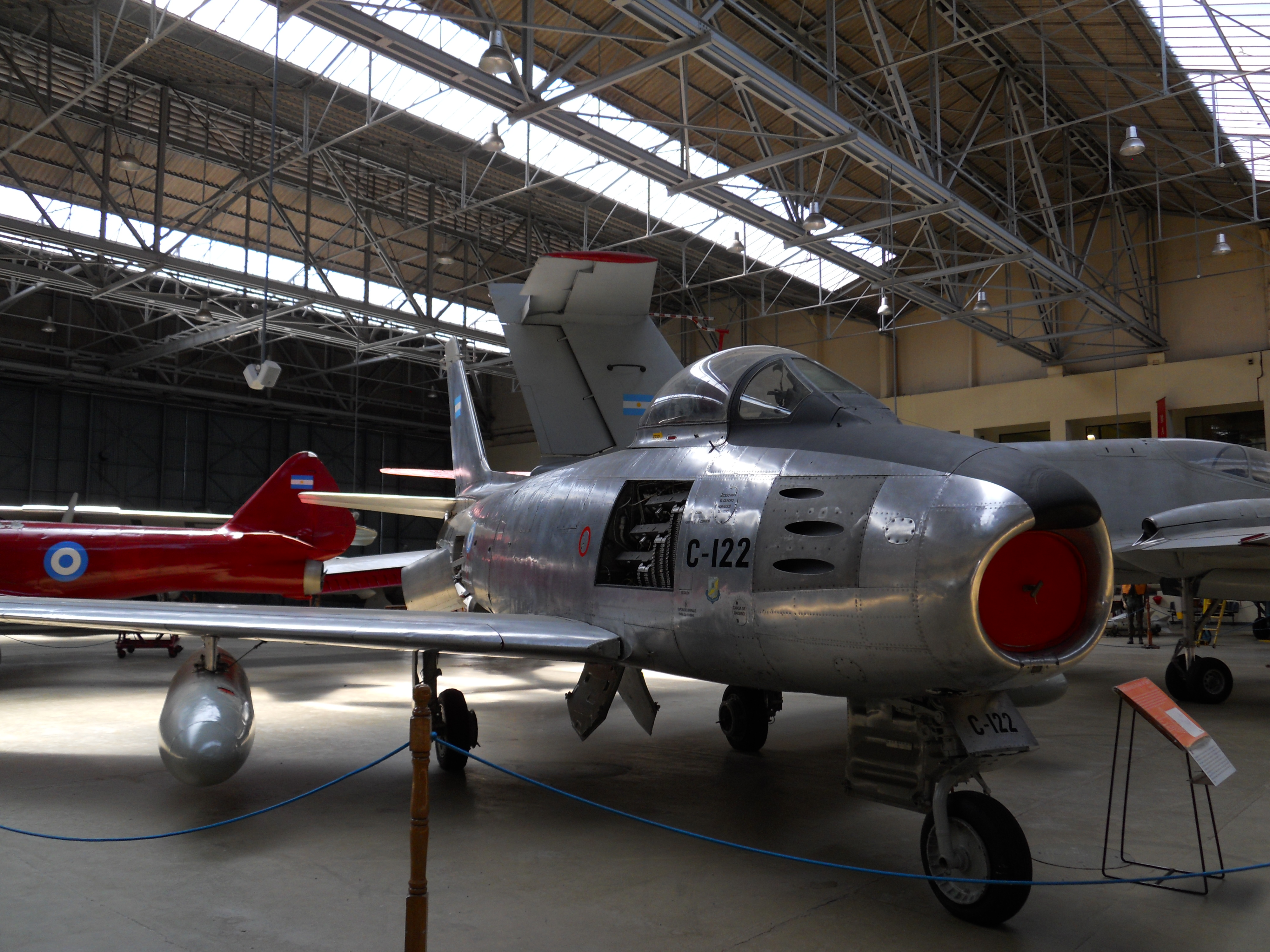 F-86 Argentino en el MNA, Moron, Provincia de Buenos Aires